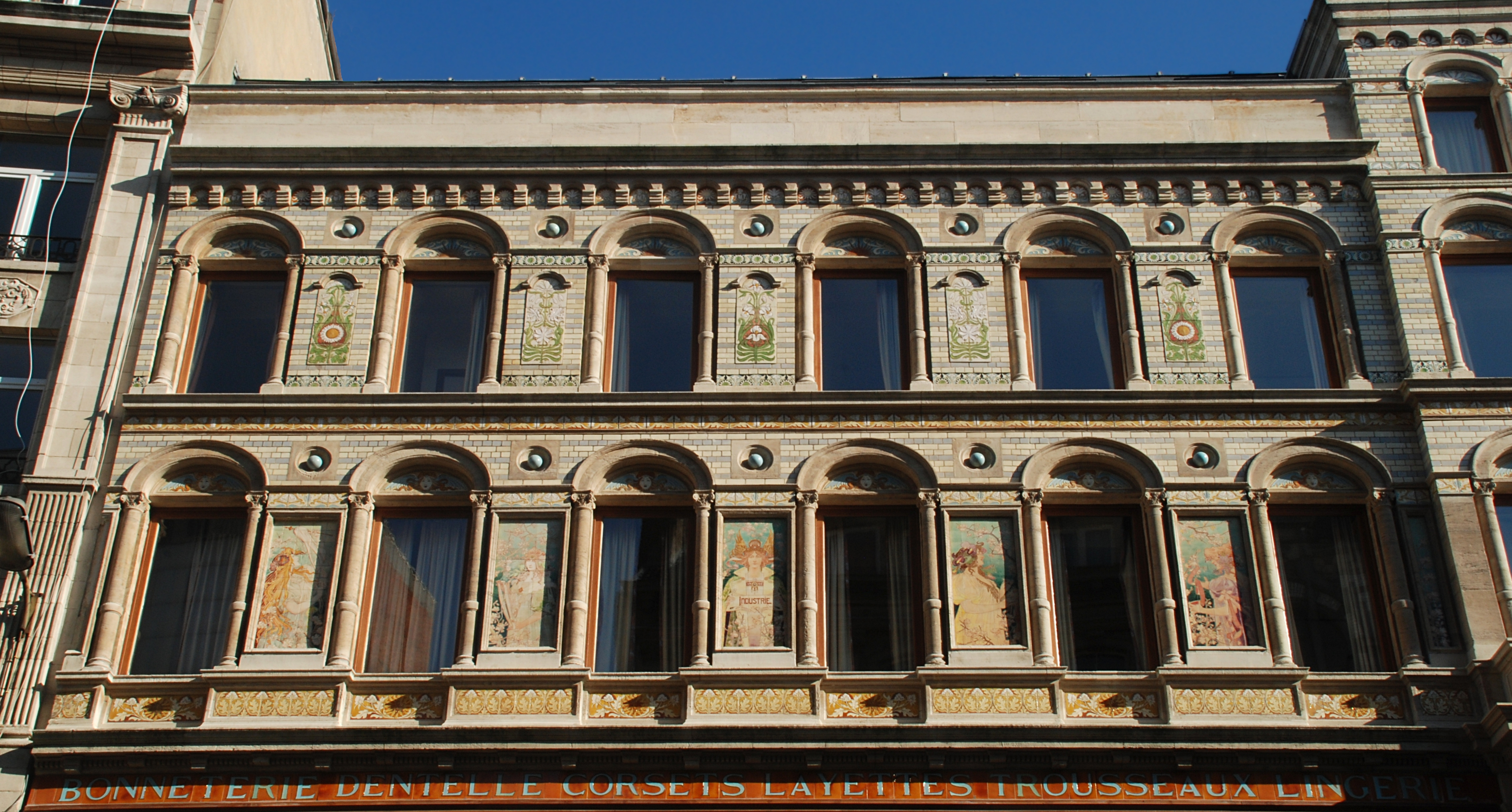 Aile gauche de la Grande Maison de Blanc à Bruxelles